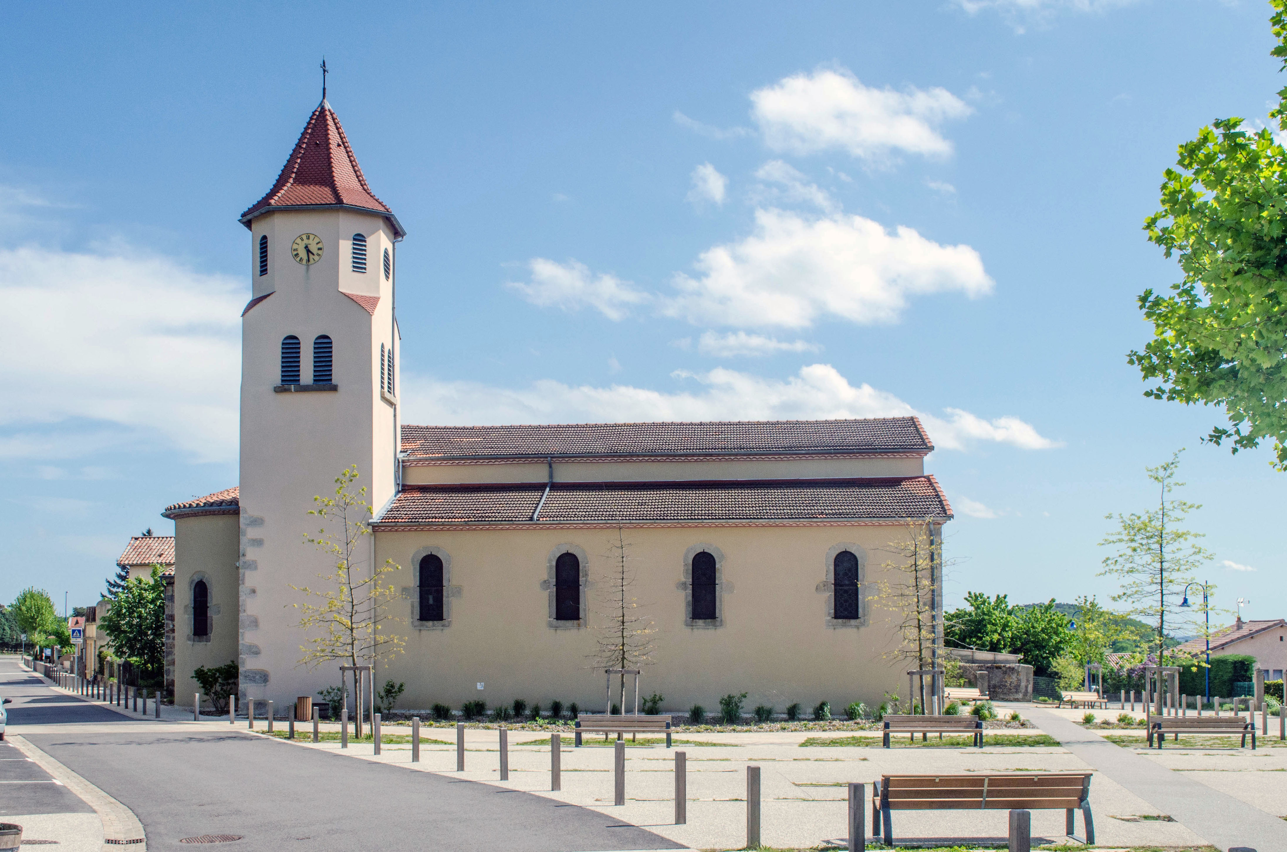 Saint-Romain-de-Lerps, Ardèche, France. L’église.